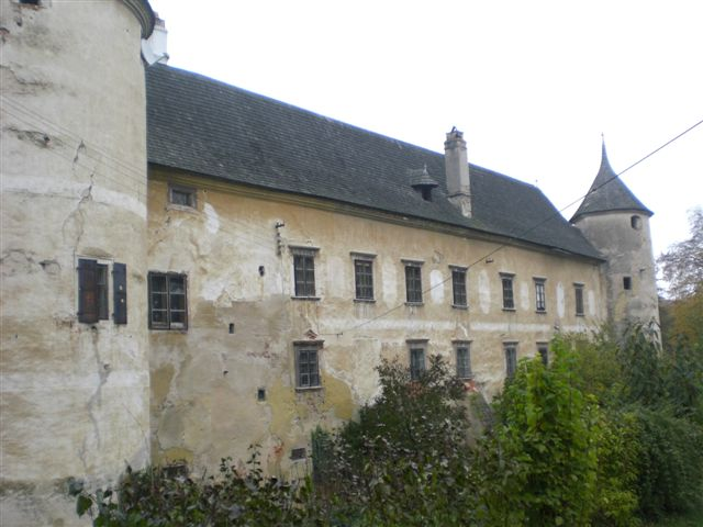 Schlossanlage in Stockern in Niederösterreich